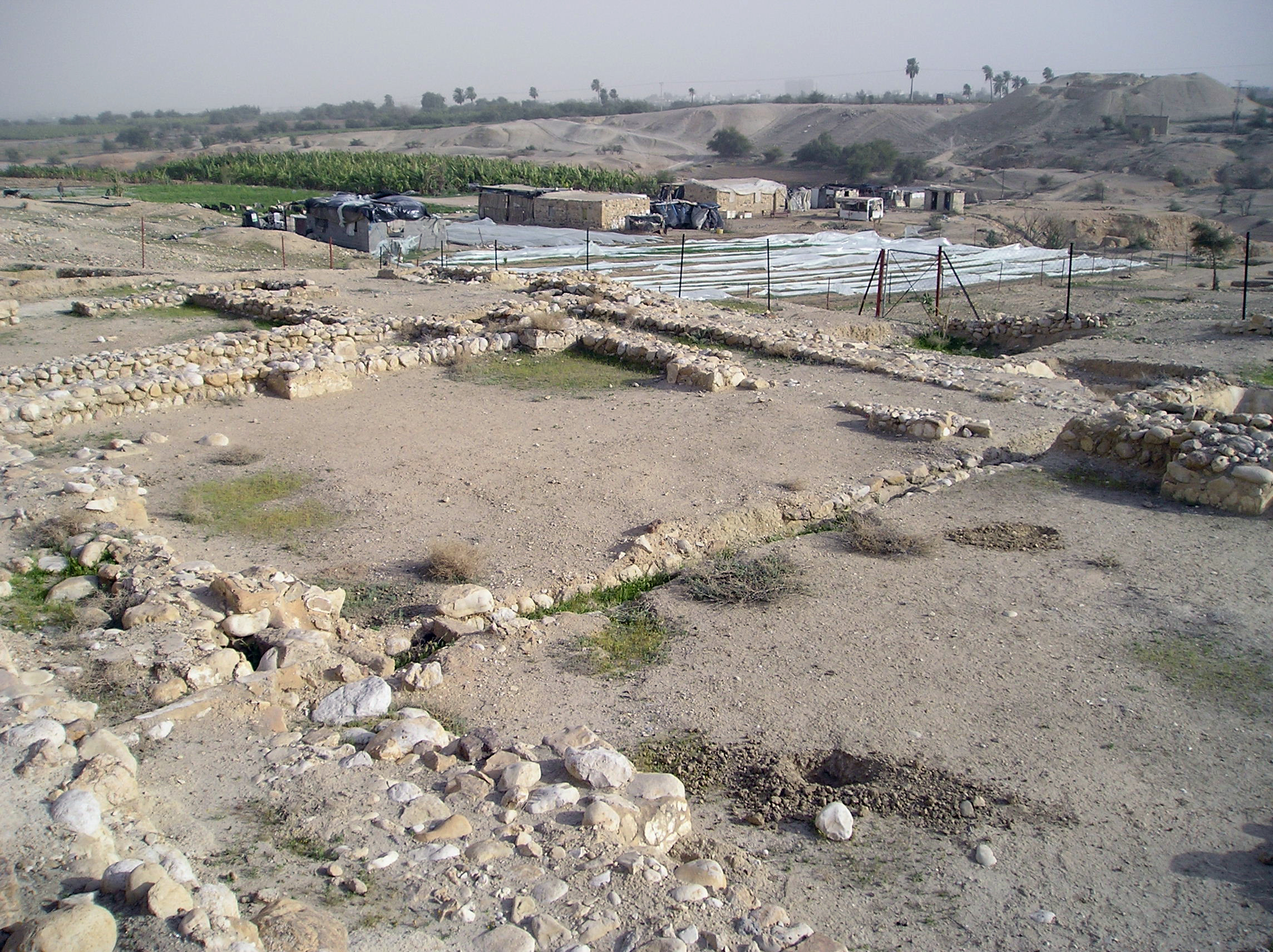 Synagoga odnaleziona przez E. Netzer w 1998. Pochodzi z II/I w przed Chr. Strefa wykopalisk na Tulul Abu el-Alayiq. Jerycho z czasów Hasmoneuszy i Heroda Wielkiego (od II w. przed Chr. do I w. po Chr.). Prace prowadzili: C. Warren - 1868, E. Sellin, C. Watzinger - 1909 e 1911, J. Kelso, D. Baramki, J. Pritchard - 1950-1951, G. Foerster e E. Netzer - 1973-1983 oraz 1986-1988. Badania trwają po dziś dzień. Zdjęcie wykonał A. Sobkowski dn. 9 marca 2006.